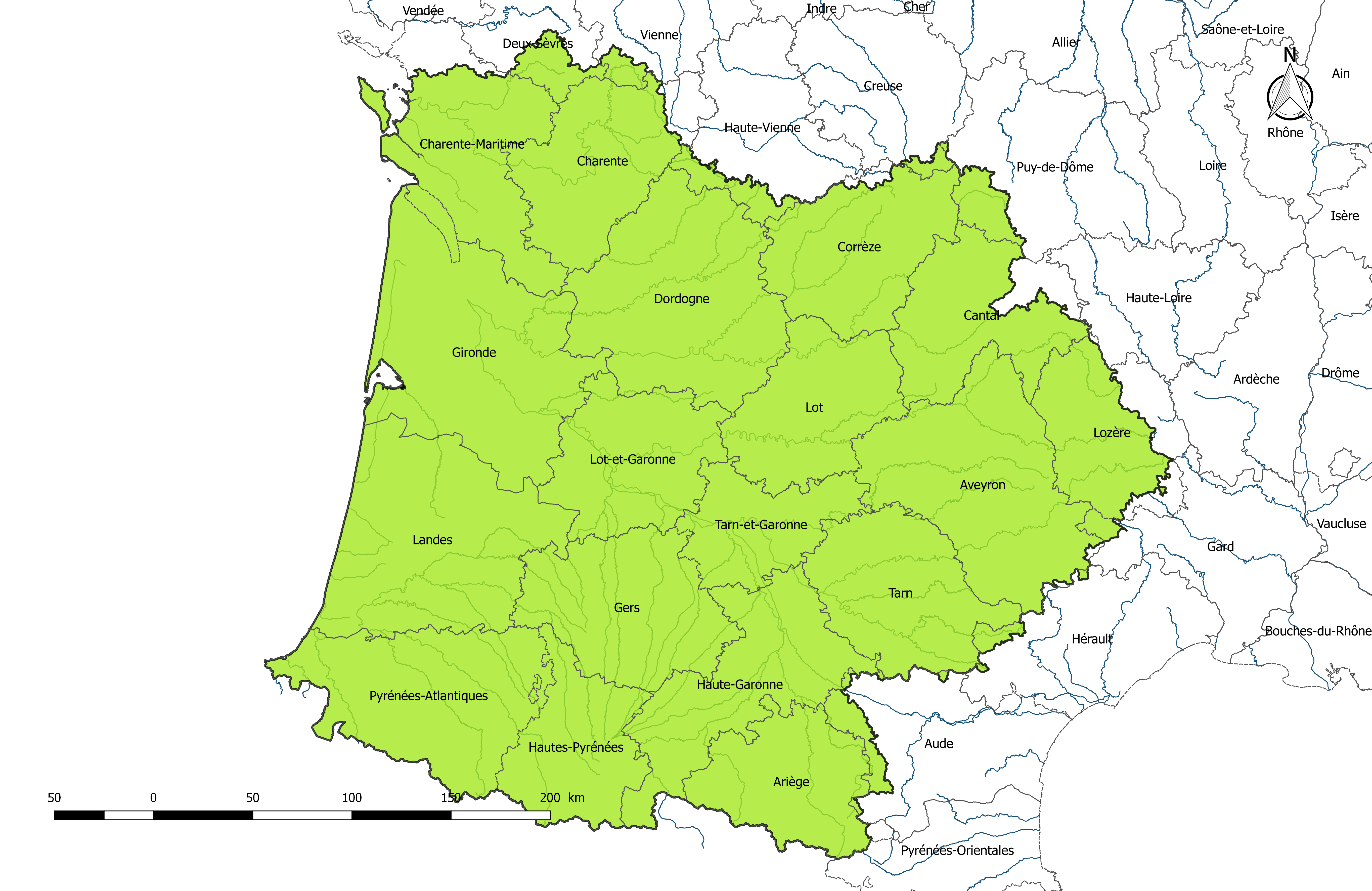 Carte de la circonscription de bassin Adour-Garonne en France, avec les départements qui la composent.